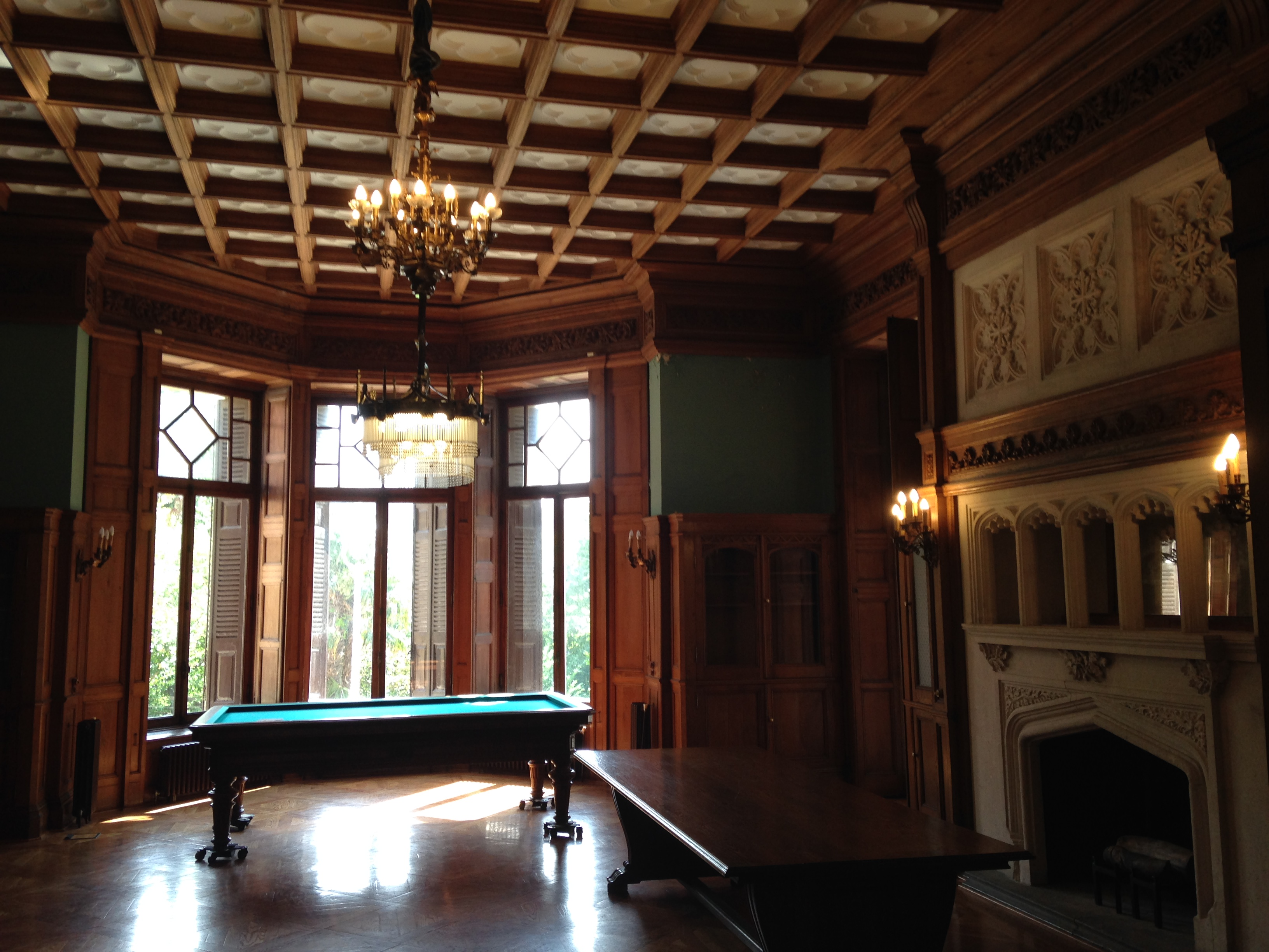 Miramar jauregiko barnealdea: Liburutegia eta billar gela